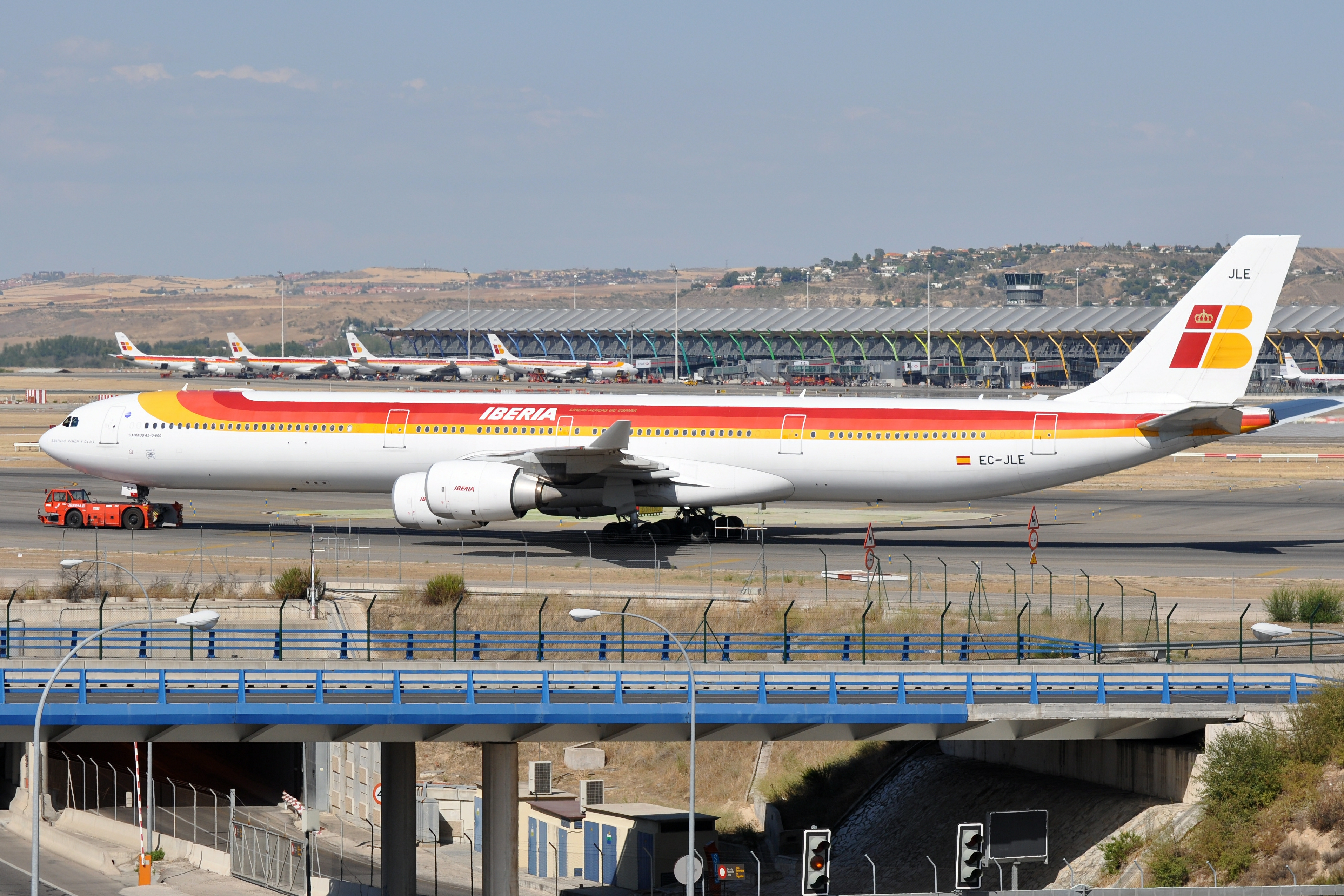 MSN 702 A340-642 IBERIA MAD